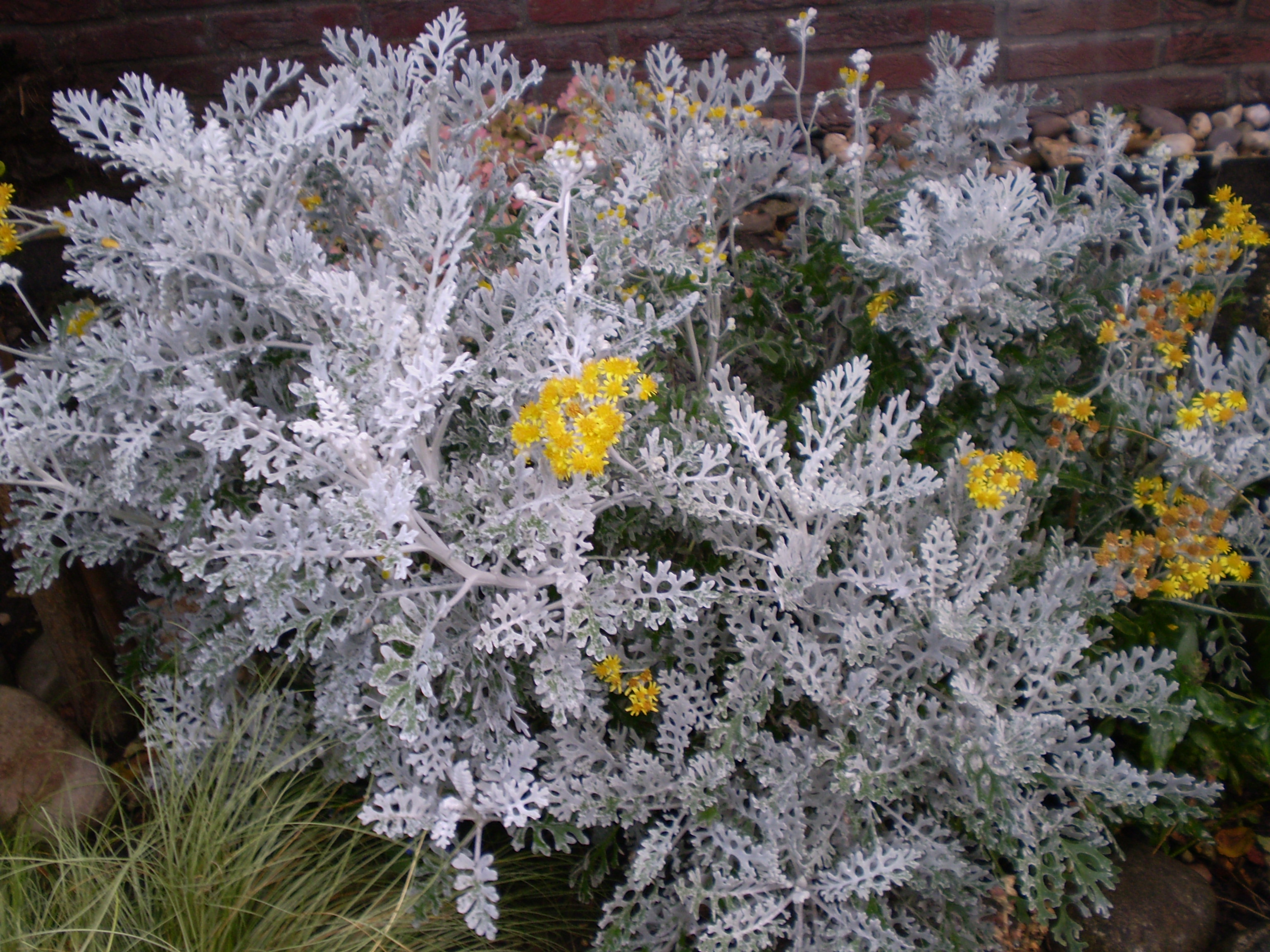 Jacobaea maritima/Senecio bicolor Silverdust/zilverblad